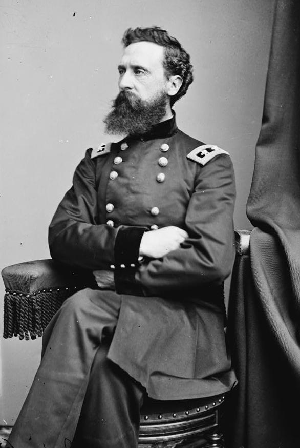 Brevet Major General George Sykes, U.S. Army